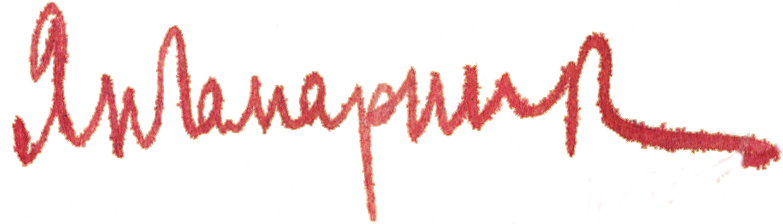 Подпись Яна Гамарника (1894—1937), советского государственного, партийного и военного деятеля.